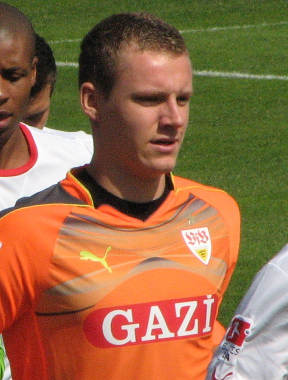 Bernd Leno zum Auftakttraining des VfB Profikaders. Aufgenommen von